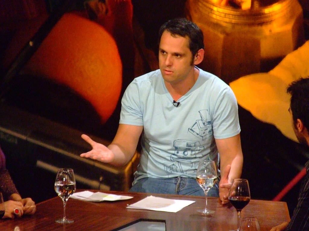 José Miguel Villouta (n. Santiago de Chile; 3 de agosto de 1976), es un presentador de televisión chileno.